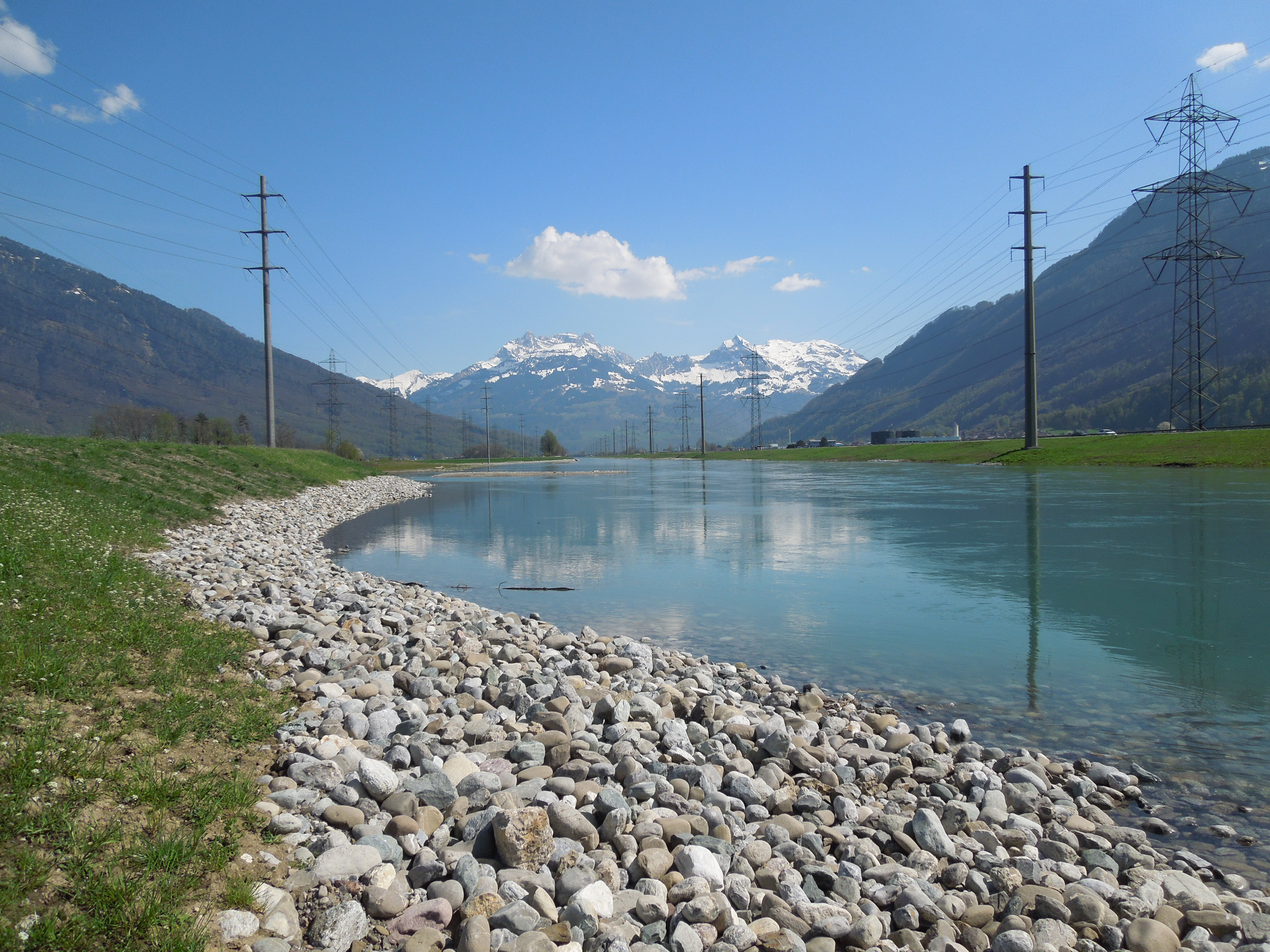 Der aufgeweitete Linthkanal beim „Hänggelgiessen“ nach der Sanierung, zwischen Schänis und Benken, 2013